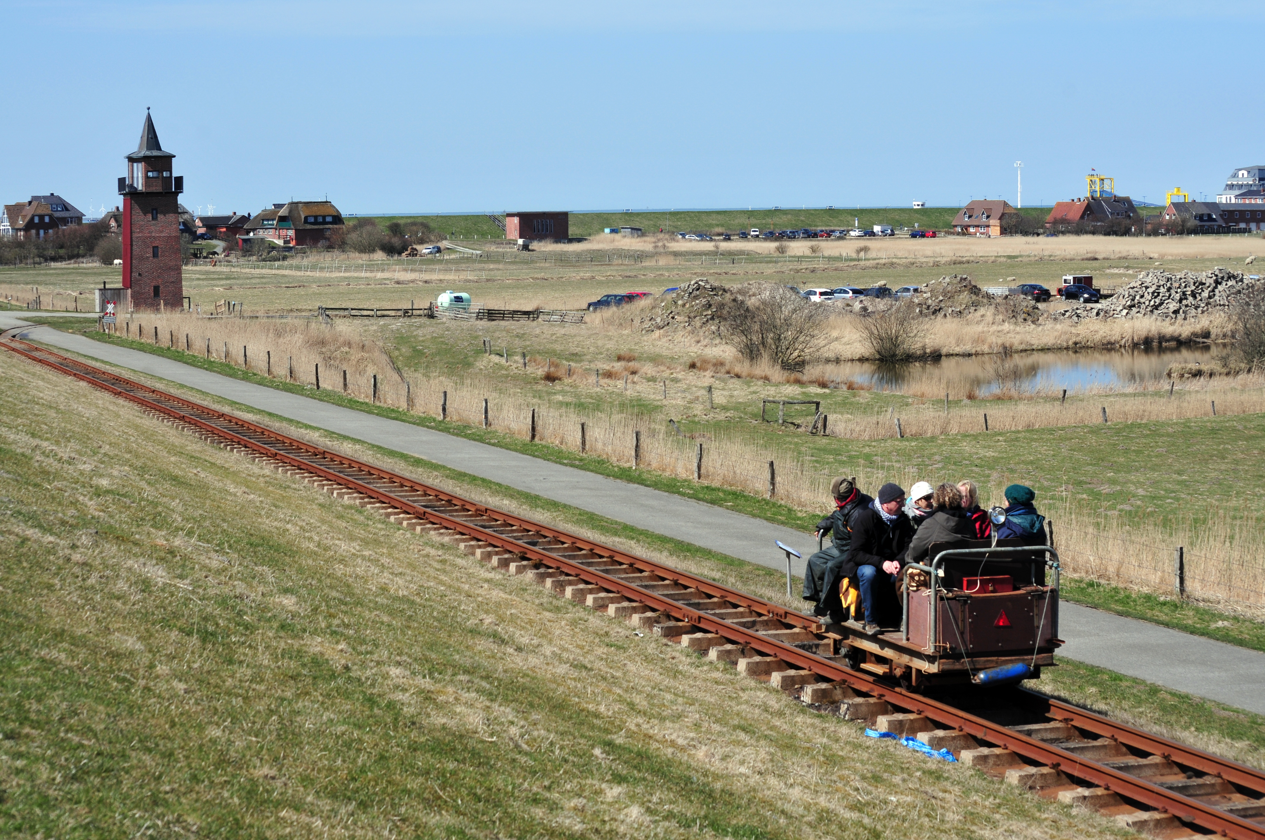 Dagebüll